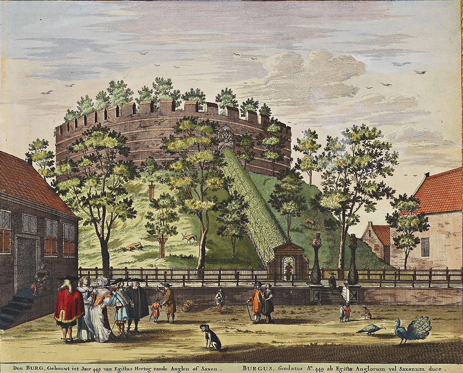 De Burcht van Leiden uit het Stedenboek van Frederick de Wit. Cultural property Burcht van Leiden, Leiden, South Holland, Netherlands Q18813071, Rijksmonument ID: 35904, Europeana ID: 2020718/DR_35904